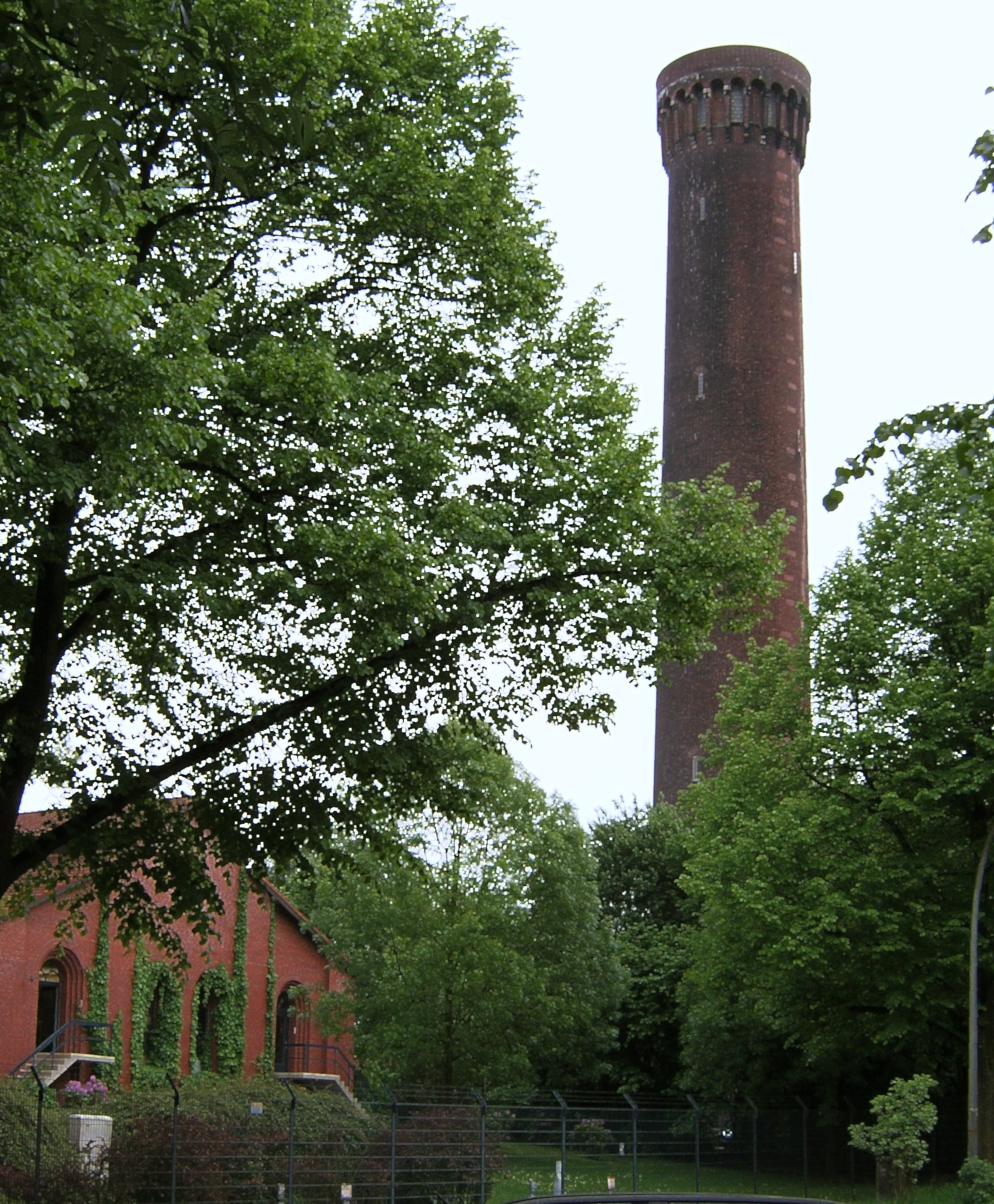 Hamburg-Rothenburgsort, Wasserturm. Erbaut nach Plänen von Alexis de Chateauneuf. This is a photograph of an architectural monument.